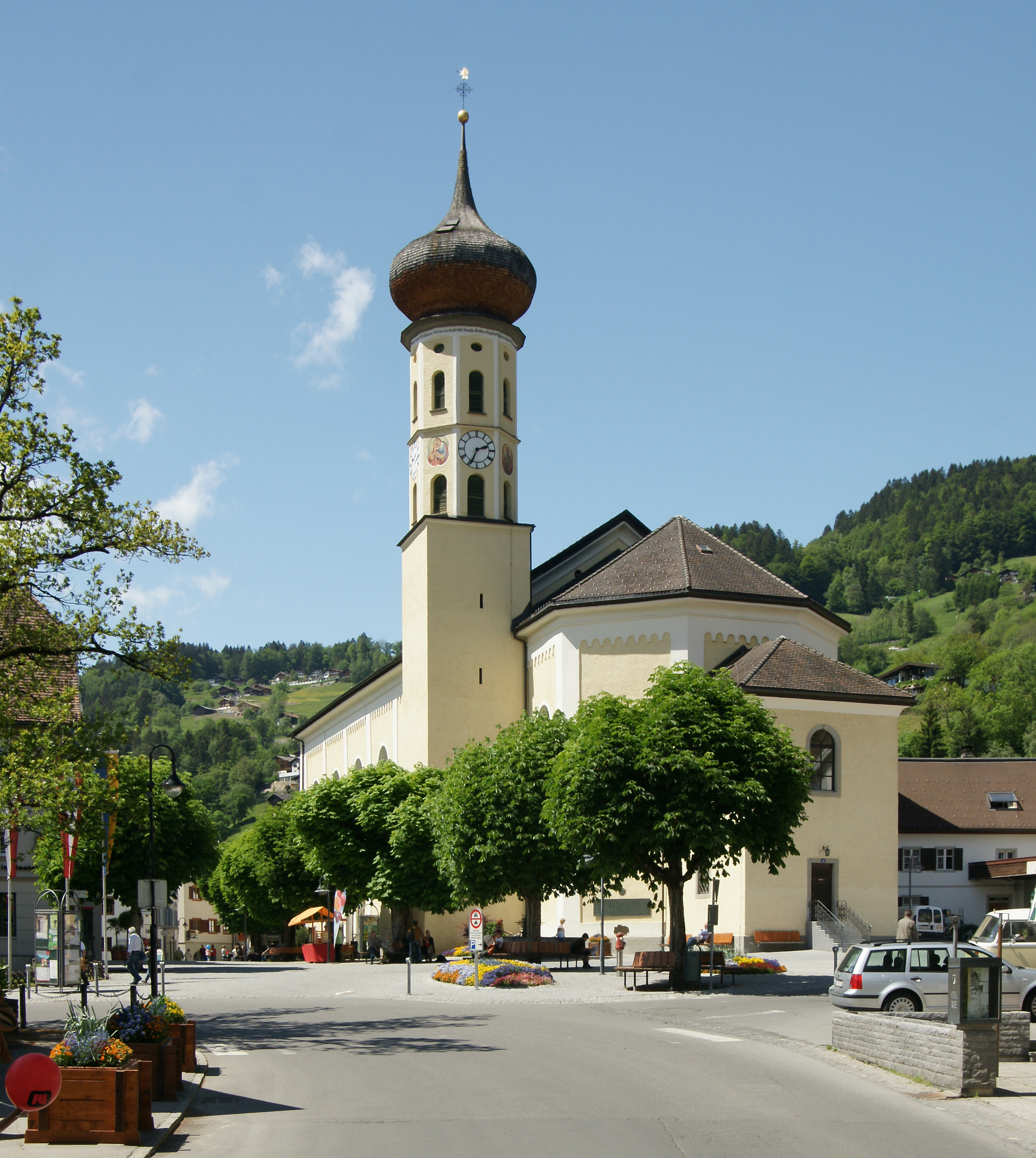 Pfarrkirche St. Jodok (Schruns) im Montafon